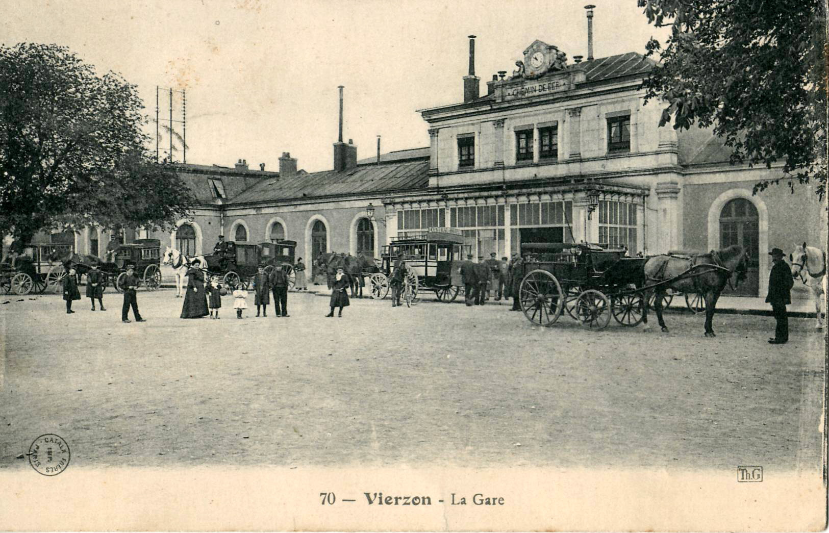 Carte postale ancienne éditée par Th. G. (Catala Frères à Paris) n°70 : VIERZON - la Gare